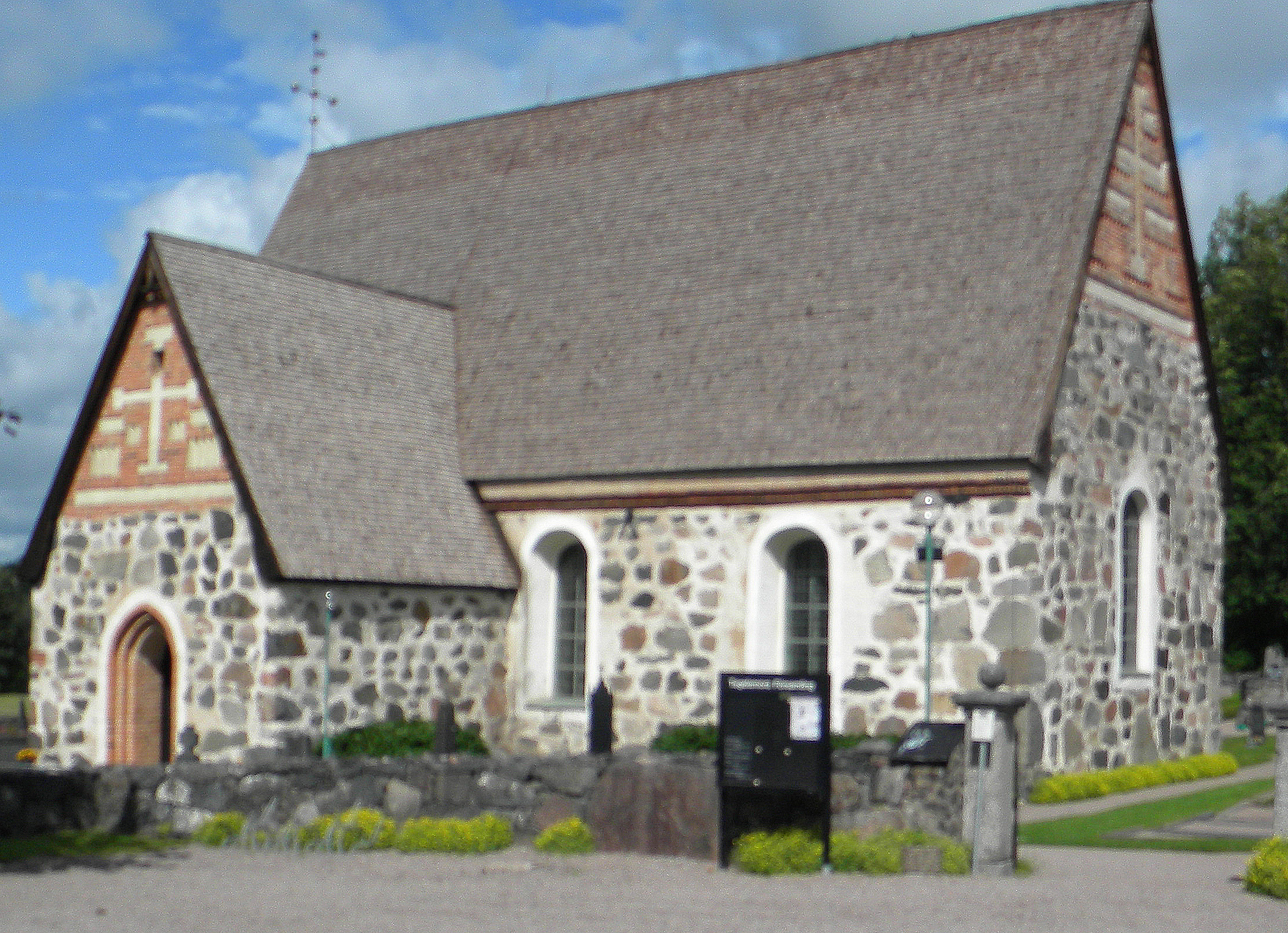 Kyrkan i Tegelsmora